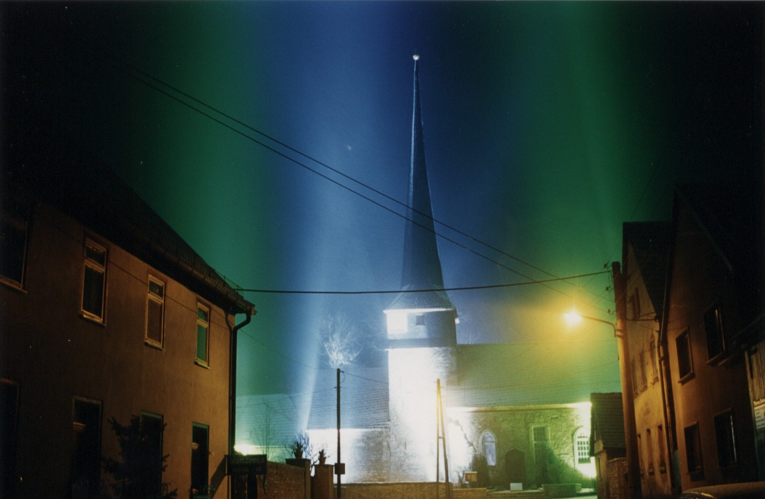 Lichtskulptur Gelmeroda LS 9803, Foto Peter Mittmann Weimar